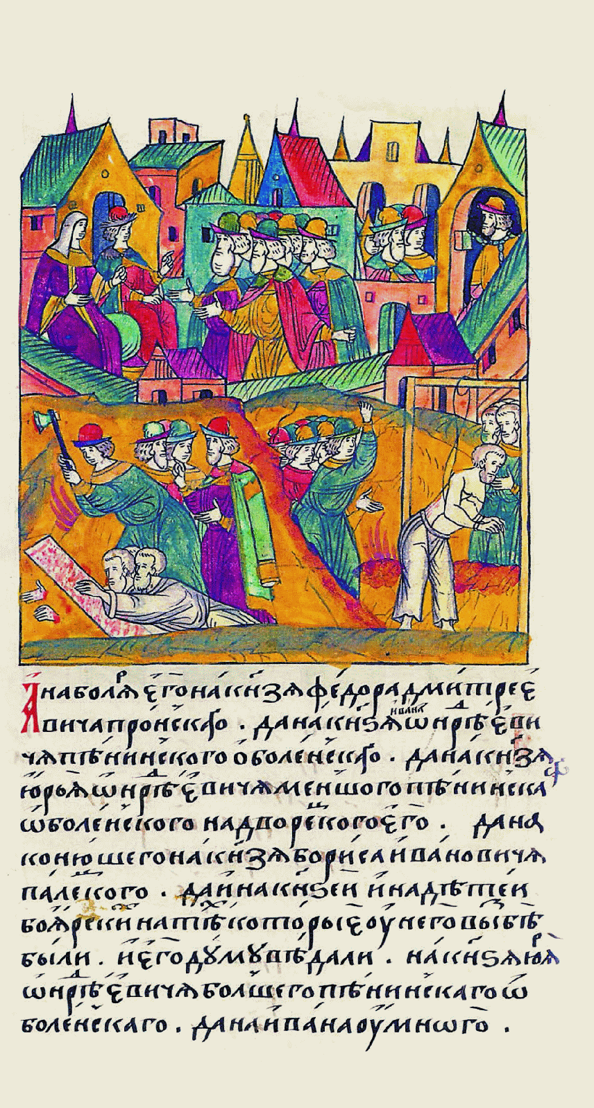 Миниатюра Лицевого летописного свода XVI в.: "А на бояр его, на князя Федора Дмитриевича Пронского да на князя Ивана Андреевича Ле- нинского Оболенского, да на князя Юрия Андреевича Меньшого Пенинского Оболен- ского, на дворецкого его, да на конюше- го, на князя Бориса Ивановича Палецкого, да и на князей и на детей боярских, на тех, которые у него в избе были и его думу знали, на князя Юрия Андре- евича Большого Пе- нинского Оболенского да на Ивана Умного, [сына Ивана Лобано- ва Колычева, да и на шурина князя Андрея, на князя Ивана Ан- дреевича Хованского, опалу свою положили, велели их пытать, да и казнить торговой казнью]».